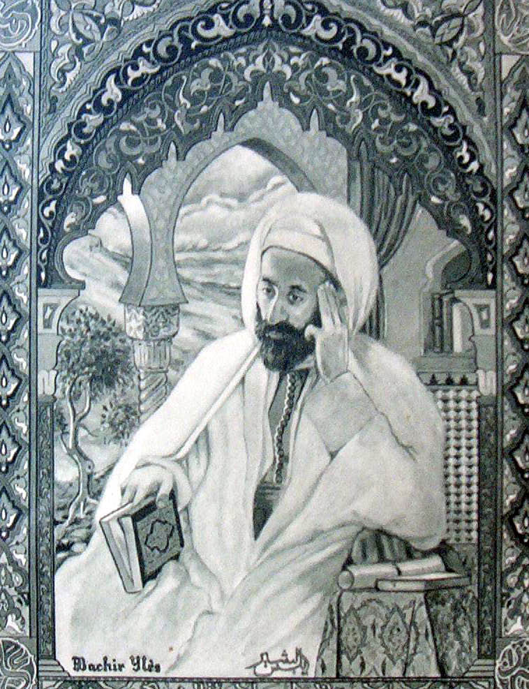 Miniature de Ben Badis par B. Yelles